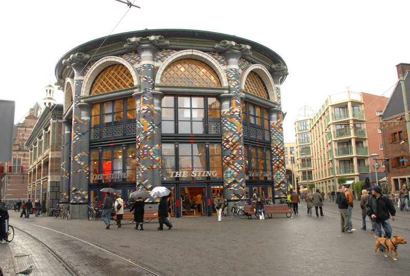 Dagelijkse Groenmarkt in het Centrum van Den Haag. Winkelcentrum.